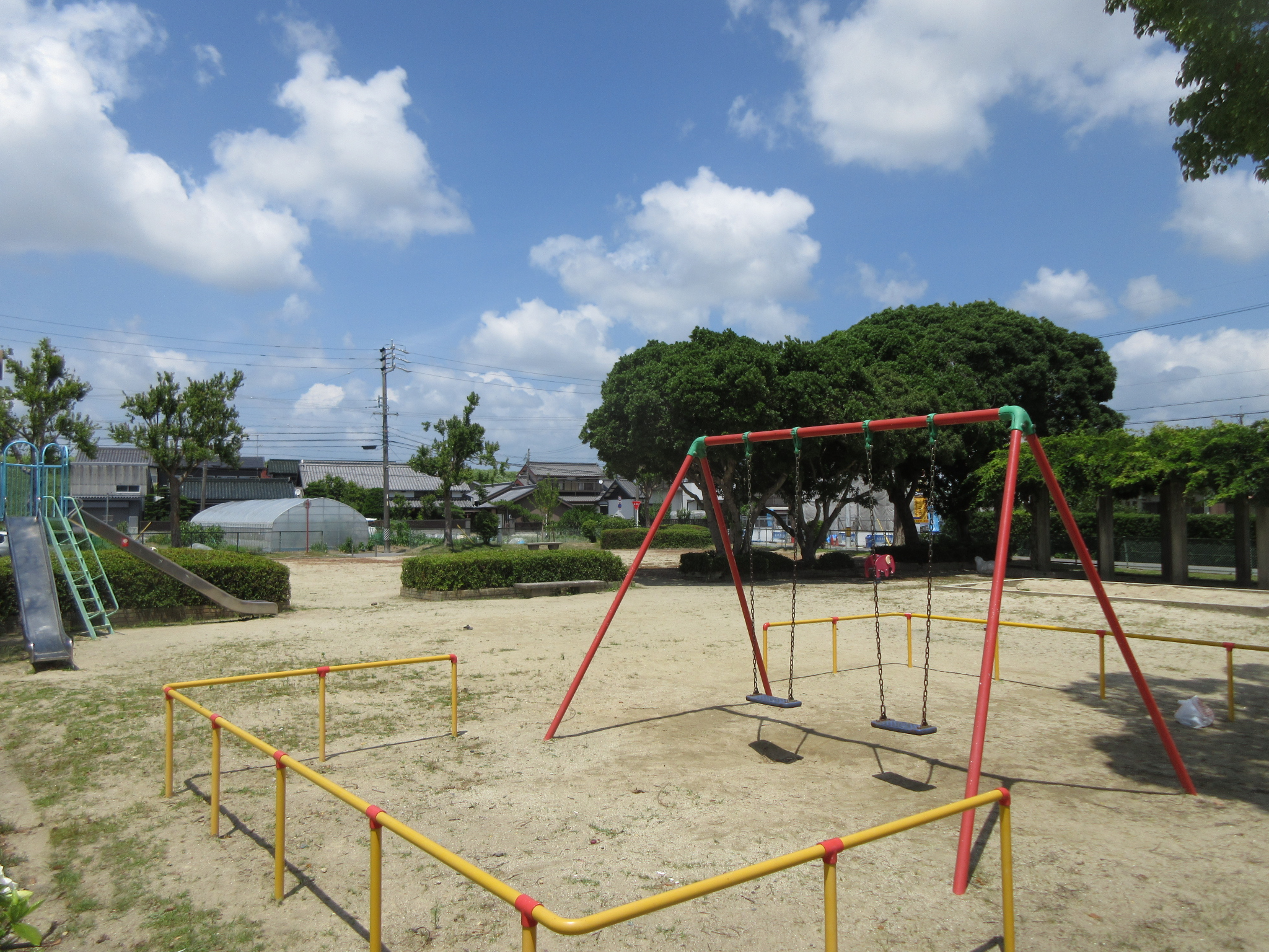 上里公園（岡崎市上里）